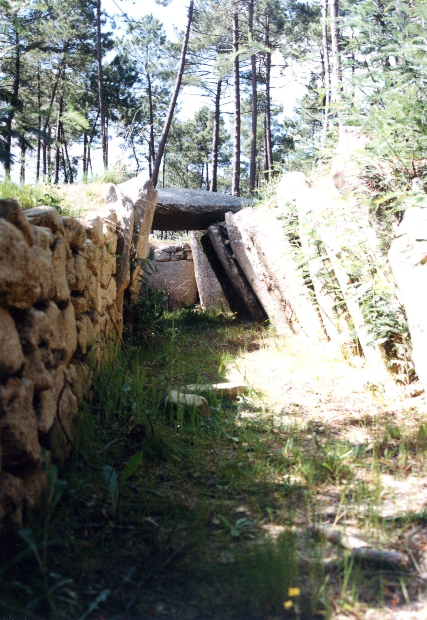 Anta do Pinheiro dos Abraços This file was uploaded for Wiki Loves Monuments in Portugal with the unique identifier 73334.